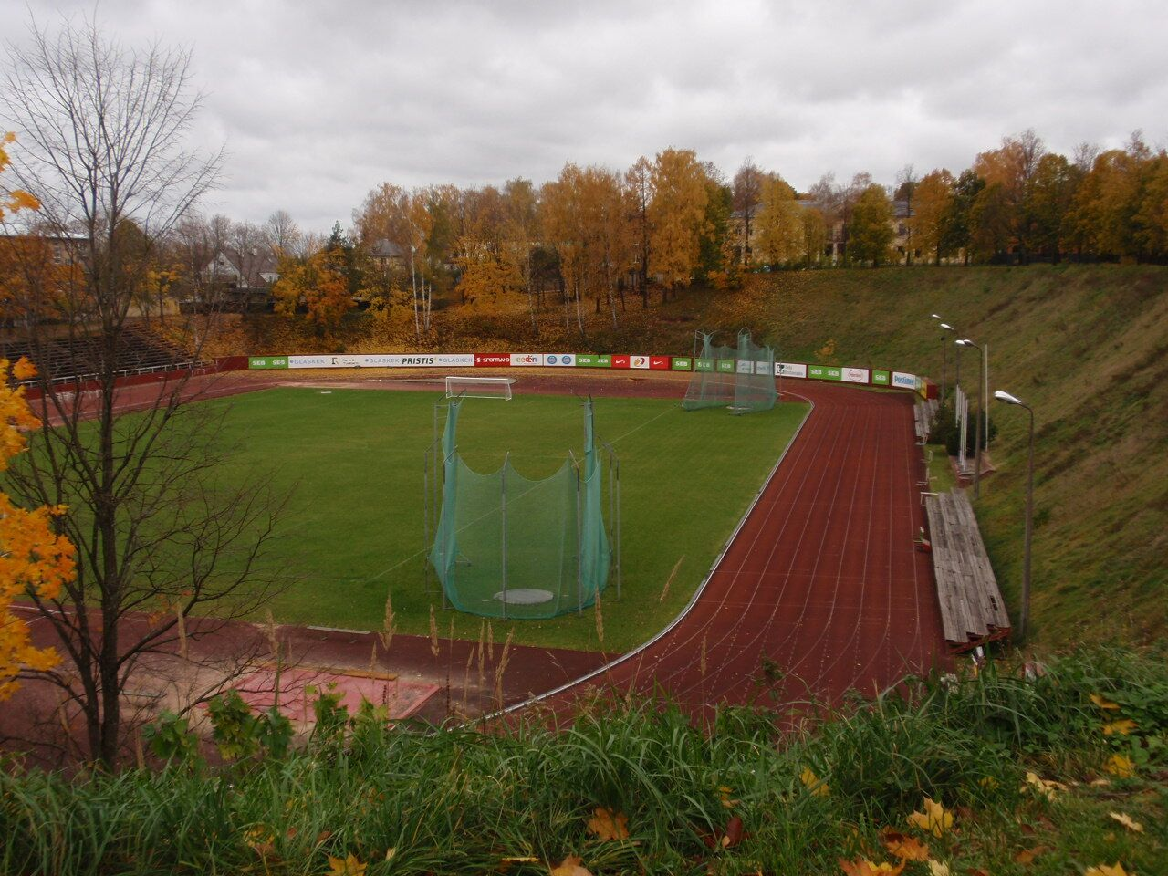 Tartu Ülikooli Staadion.